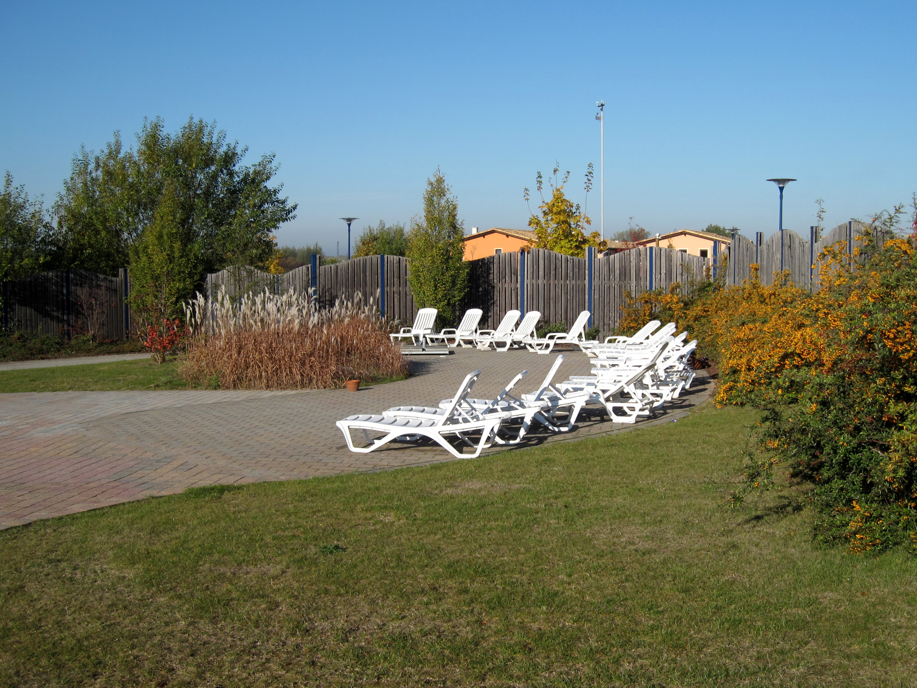 Saunagarten in der NaturTherme Templin, Templin, Land Brandenburg, Deutschland